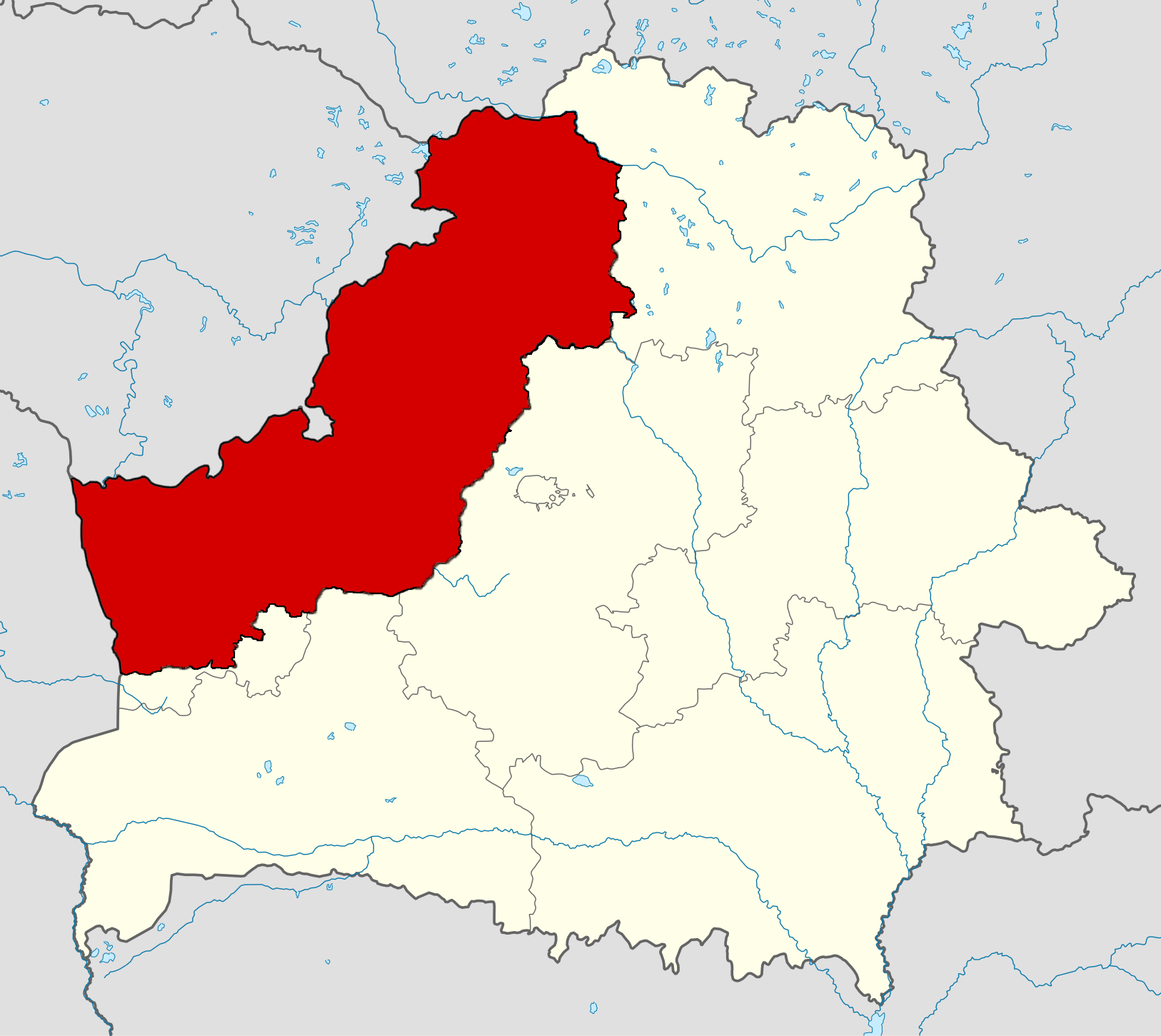 Выдуманая дзяржава з легенды стратэгічных вучэнняў "Захад-2017"